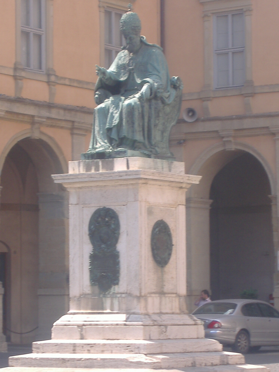 La statua bronzea di Sisto Quinto in piazza Cavour a Camerino